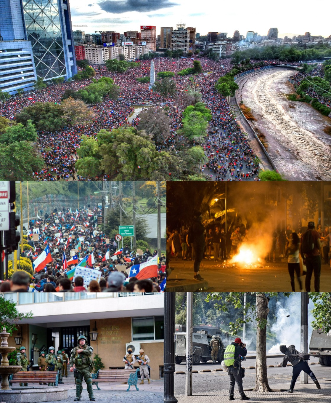 Collage de las protestas en Chile de 2019 a 2020